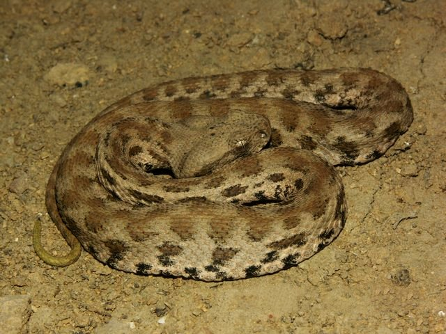 Macrovipera lebetina obtusa